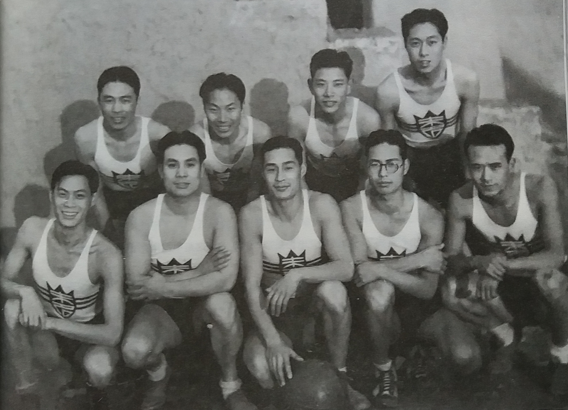 未名明星篮球队（前排中间位金焰）